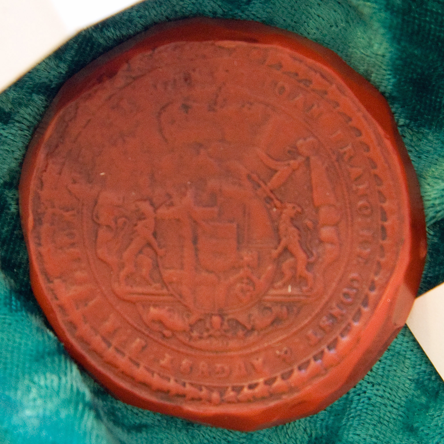 Siegel des Johann Franz Schenk von Stauffenberg, Bischof von Konstanz. Sammlung im Meersburger Neuen Schloss